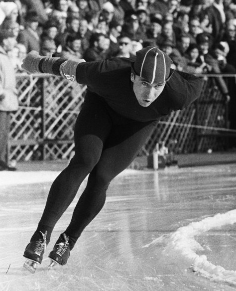 Yevgeny Grishin